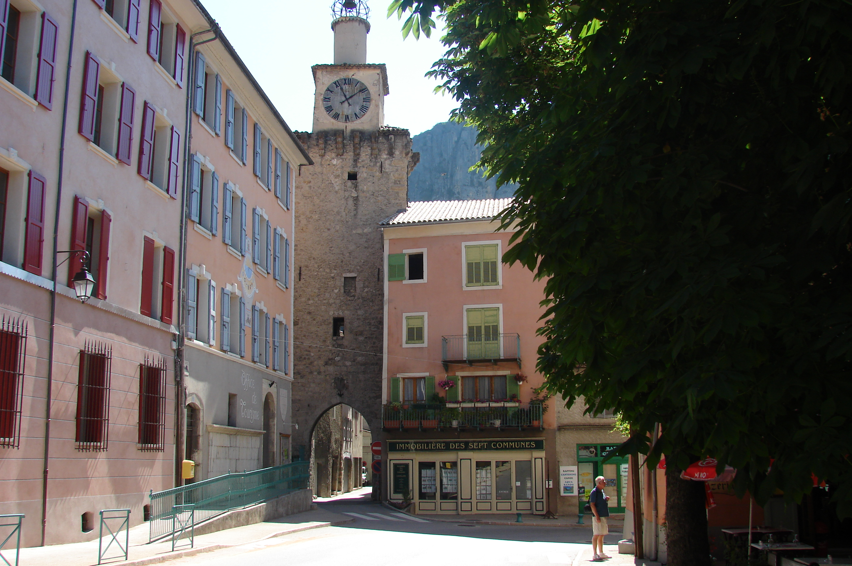 Castellane